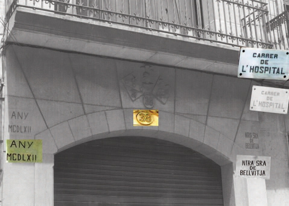 1482 inscripcio C Hospital M D. Bellvitja